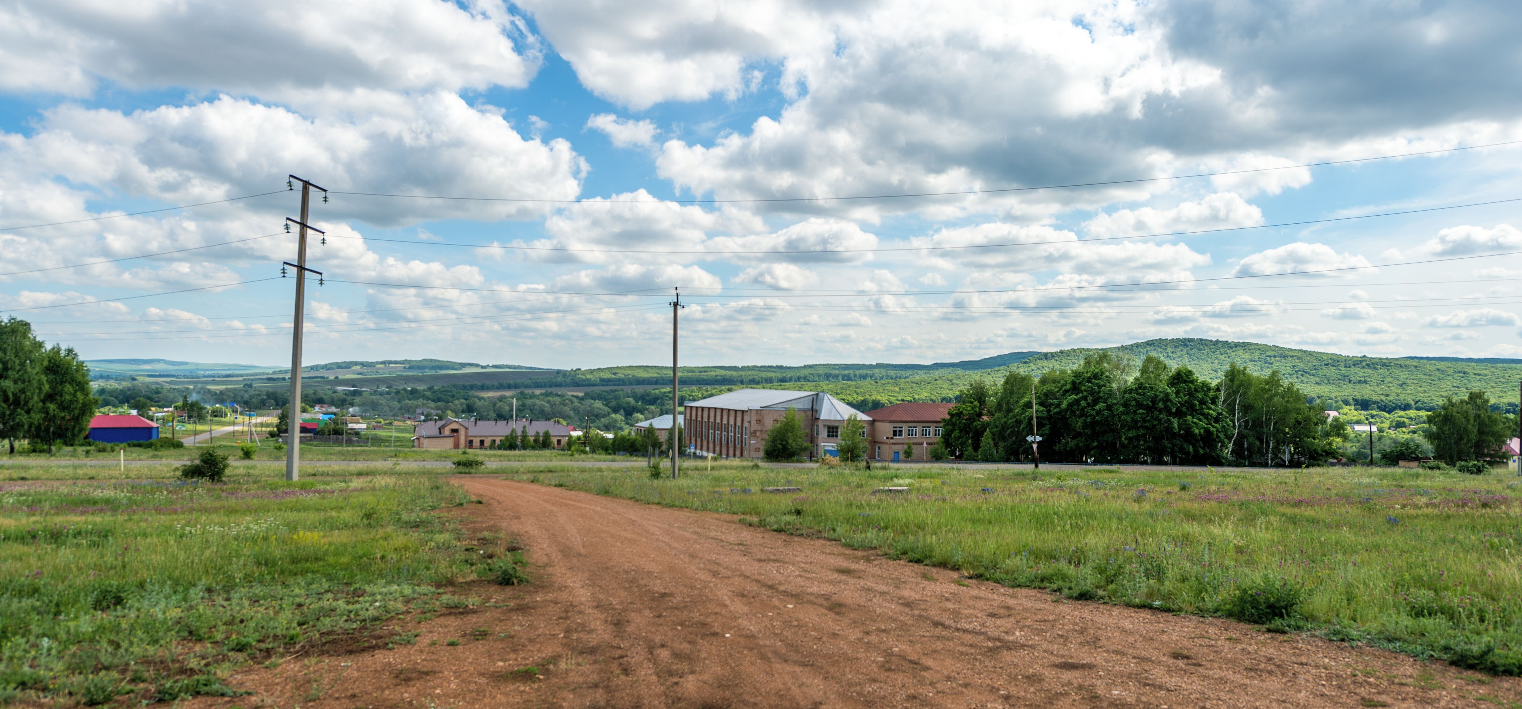 Посёлок Ташлы Оренбургская область